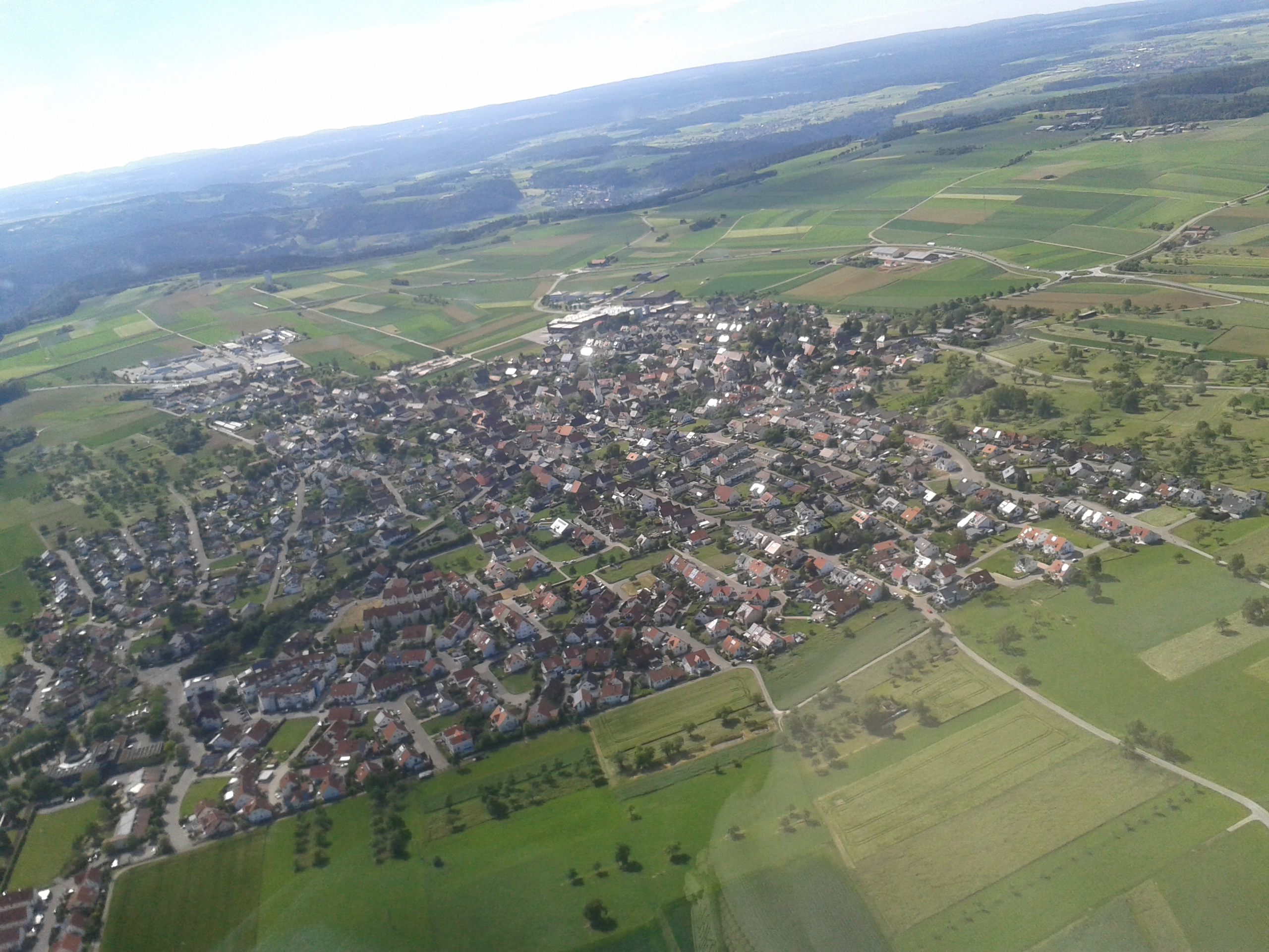 Oberjettingen (bei Herrenberg / Stuttgart) aus der Luft